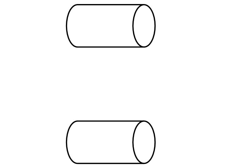 Tubos que representan agujeros de gusano.